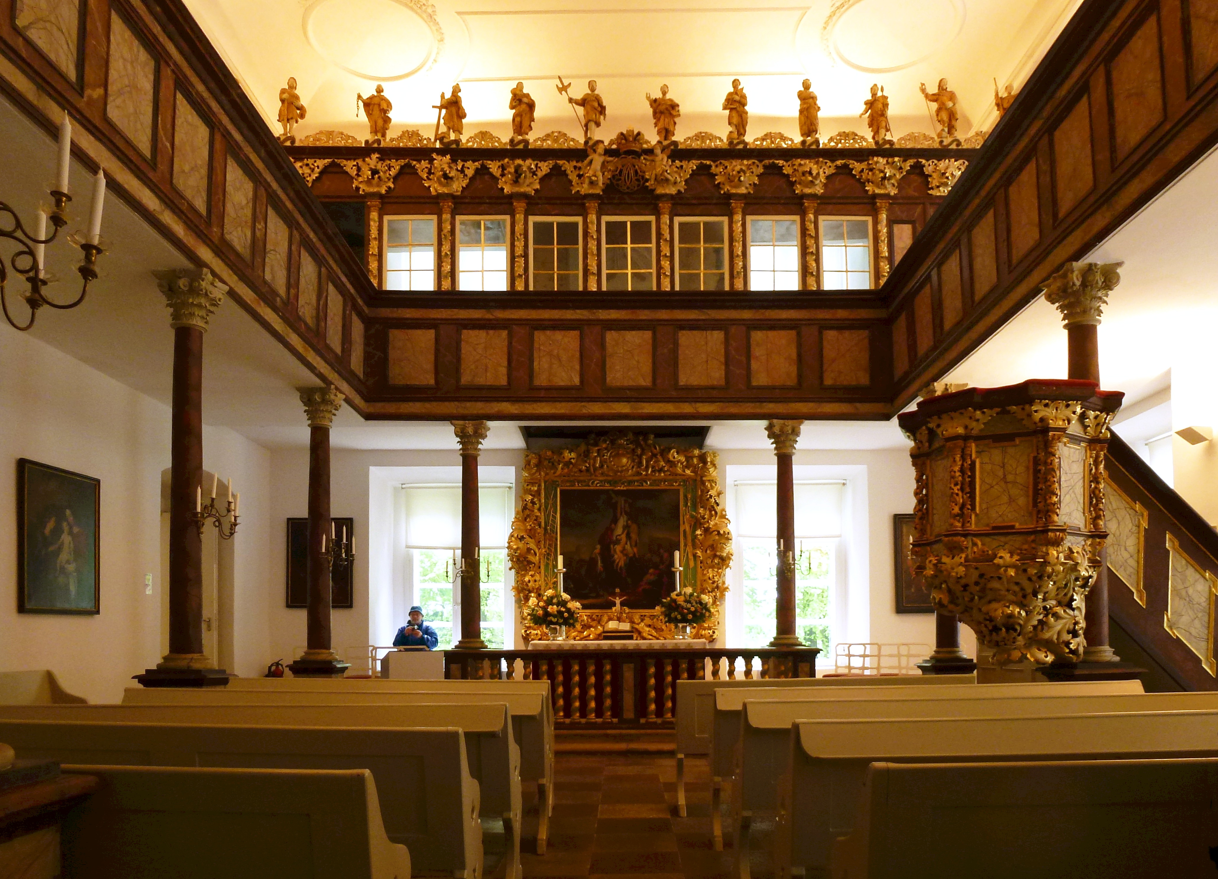 Eutiner Schloss-Kirche